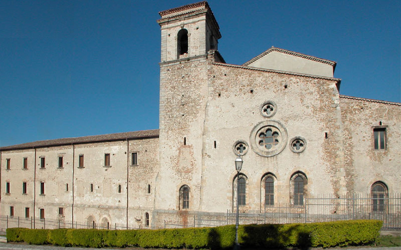 San Giovanni in Fiore - Abbazia Florens